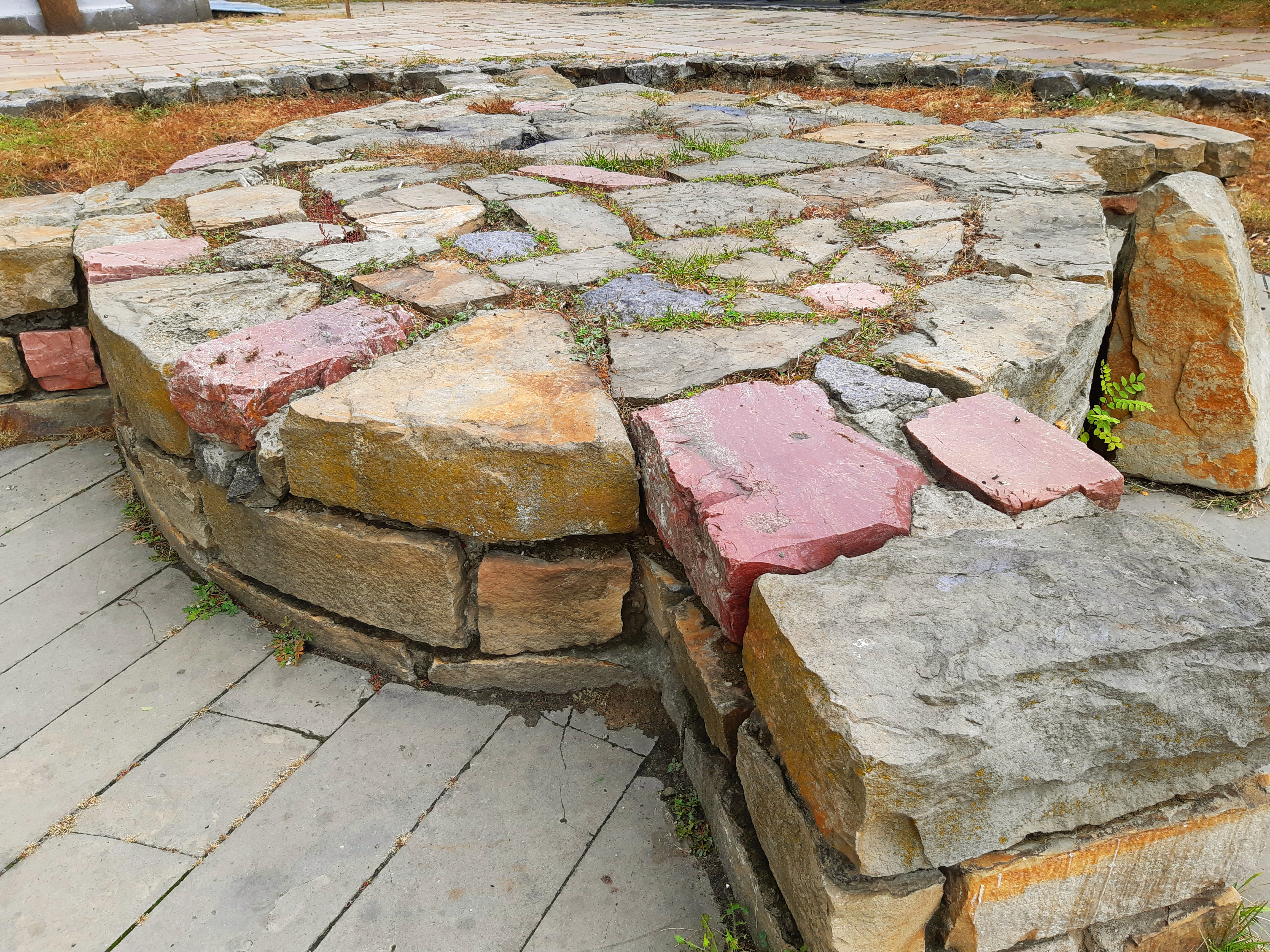 Язичницьке капище на Старокиївській горі (відтворене). Київ, вул. Володимирська, 2